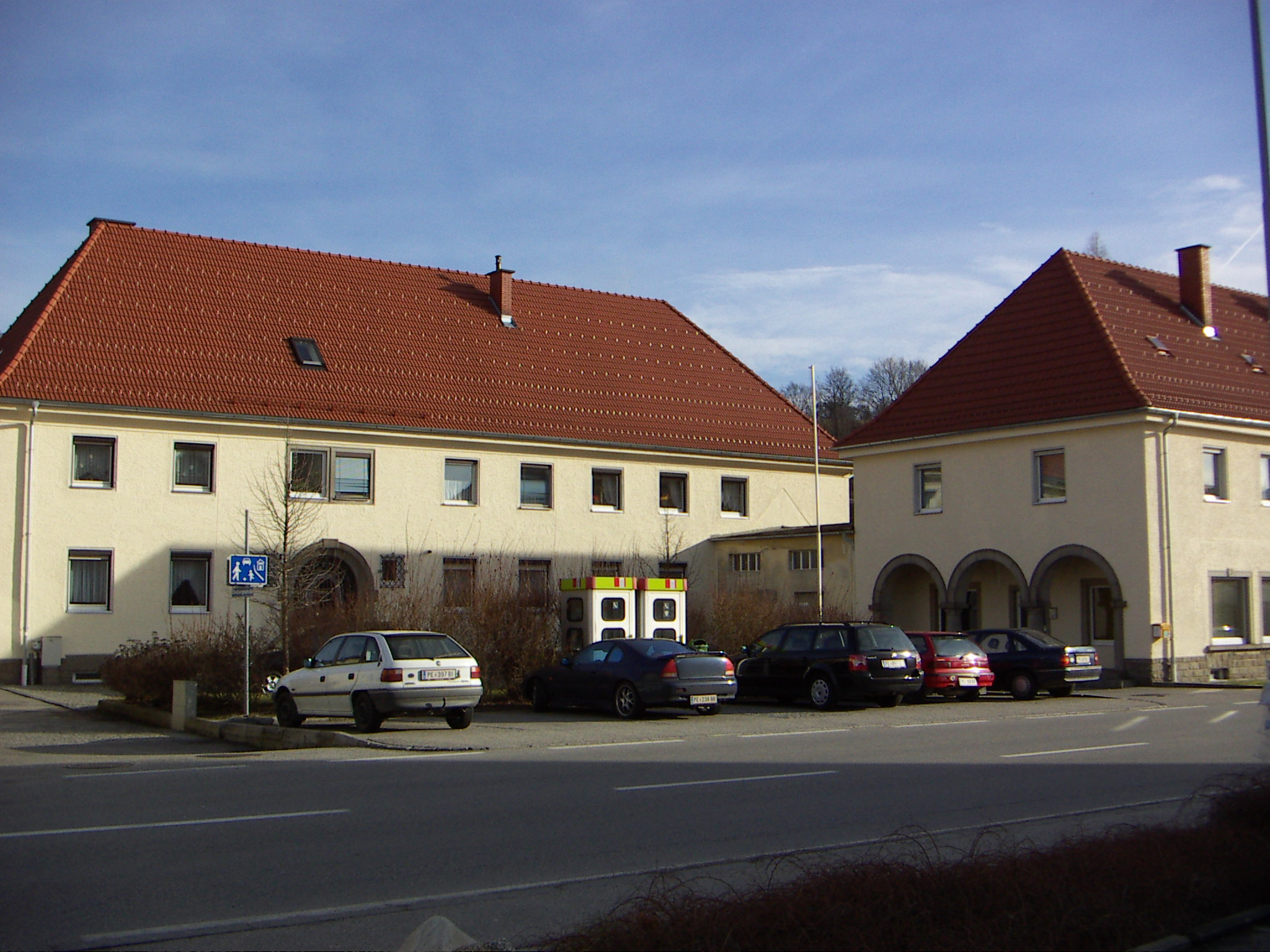 Administrational Buildings of "Deutsche Erd- und Steinwerke GmbH Berlin (DEST) at St. Georgen an der Gusen